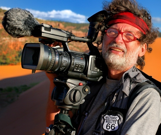 Filmemacher und Gründer des FernwehParks